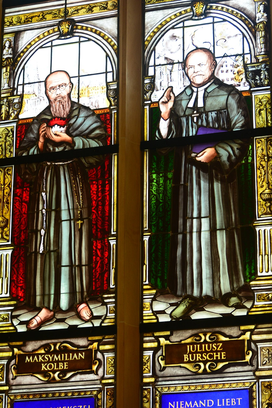 Witraże kościoła św. Krzysztofa we Wrocławiu